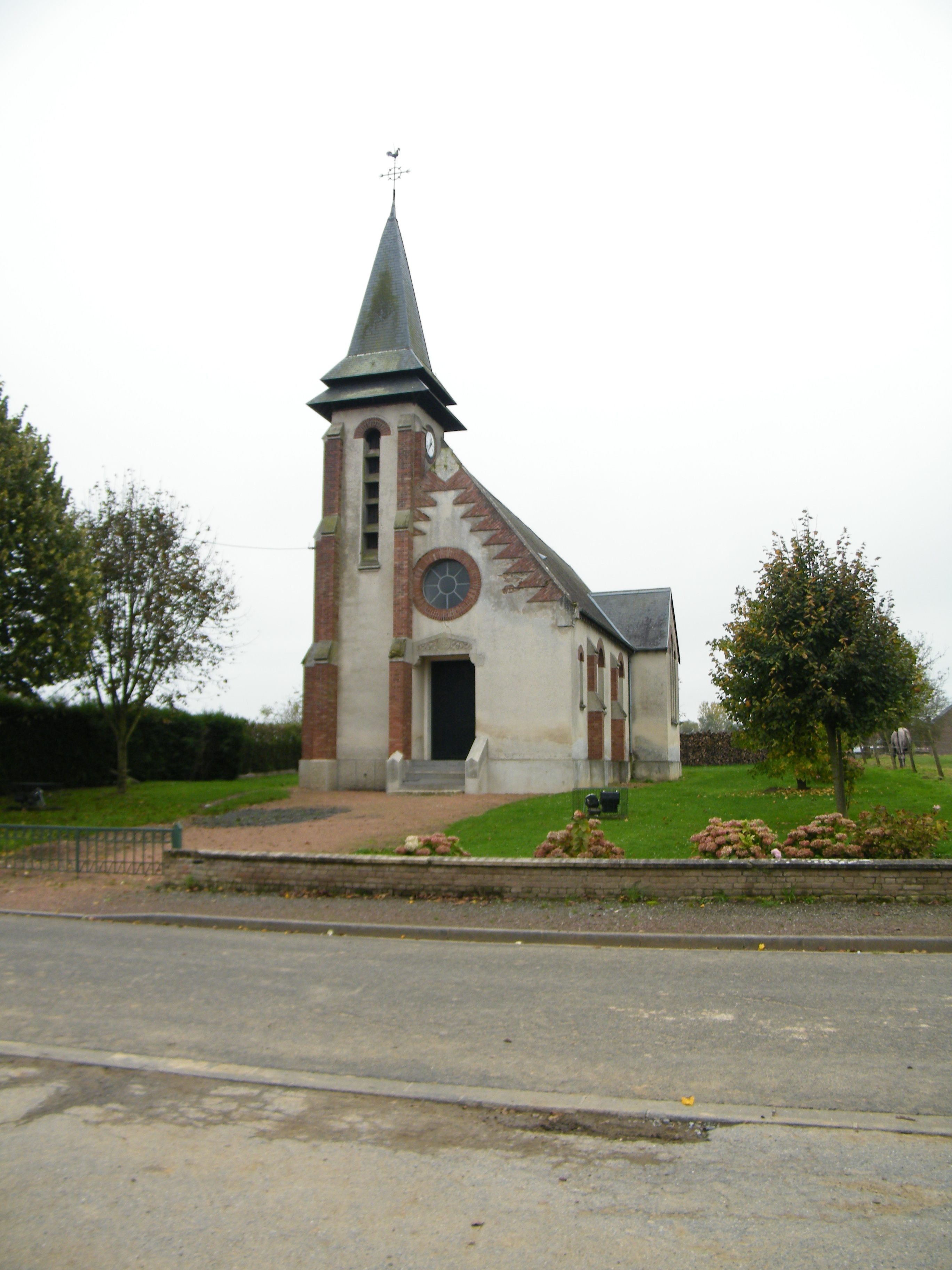 église.